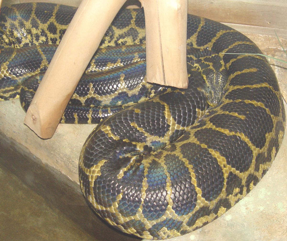 Eunectes notaeus / парагвайская анаконда